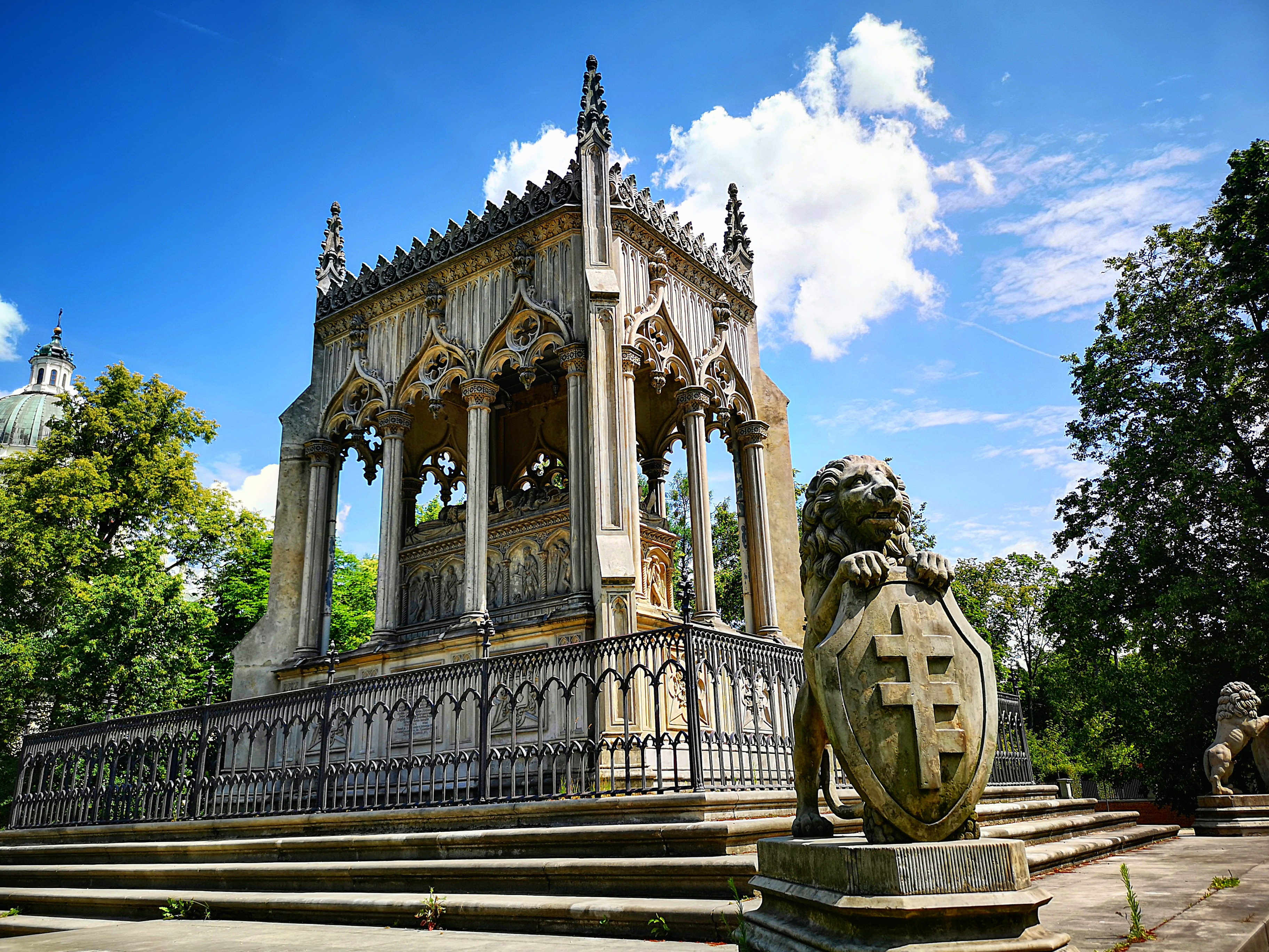 Wilanów, Mauzoleum Potockich w Wilanowie